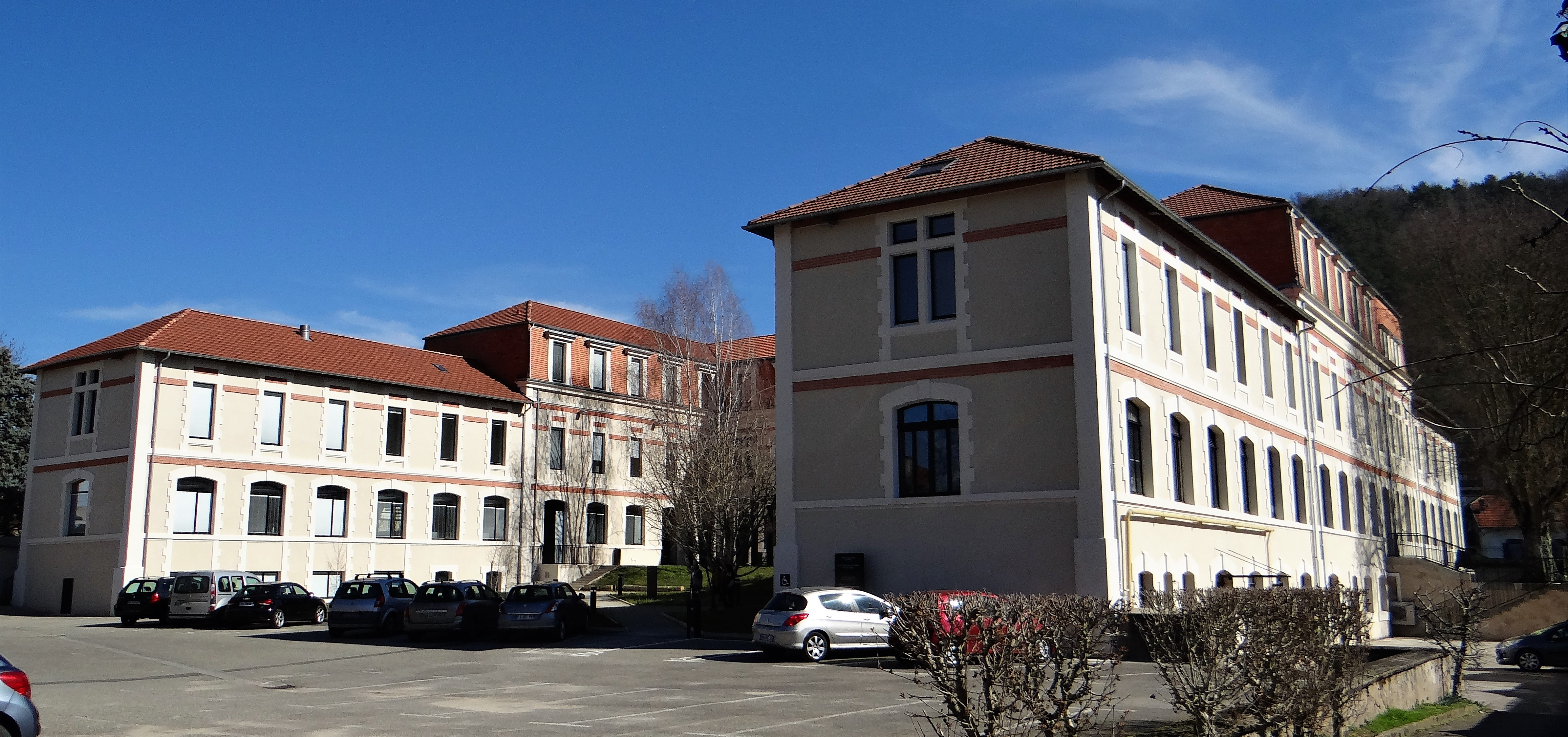 Cahors - Centre universitaire Maurice-Faure, ancienne école normale d'institutrice